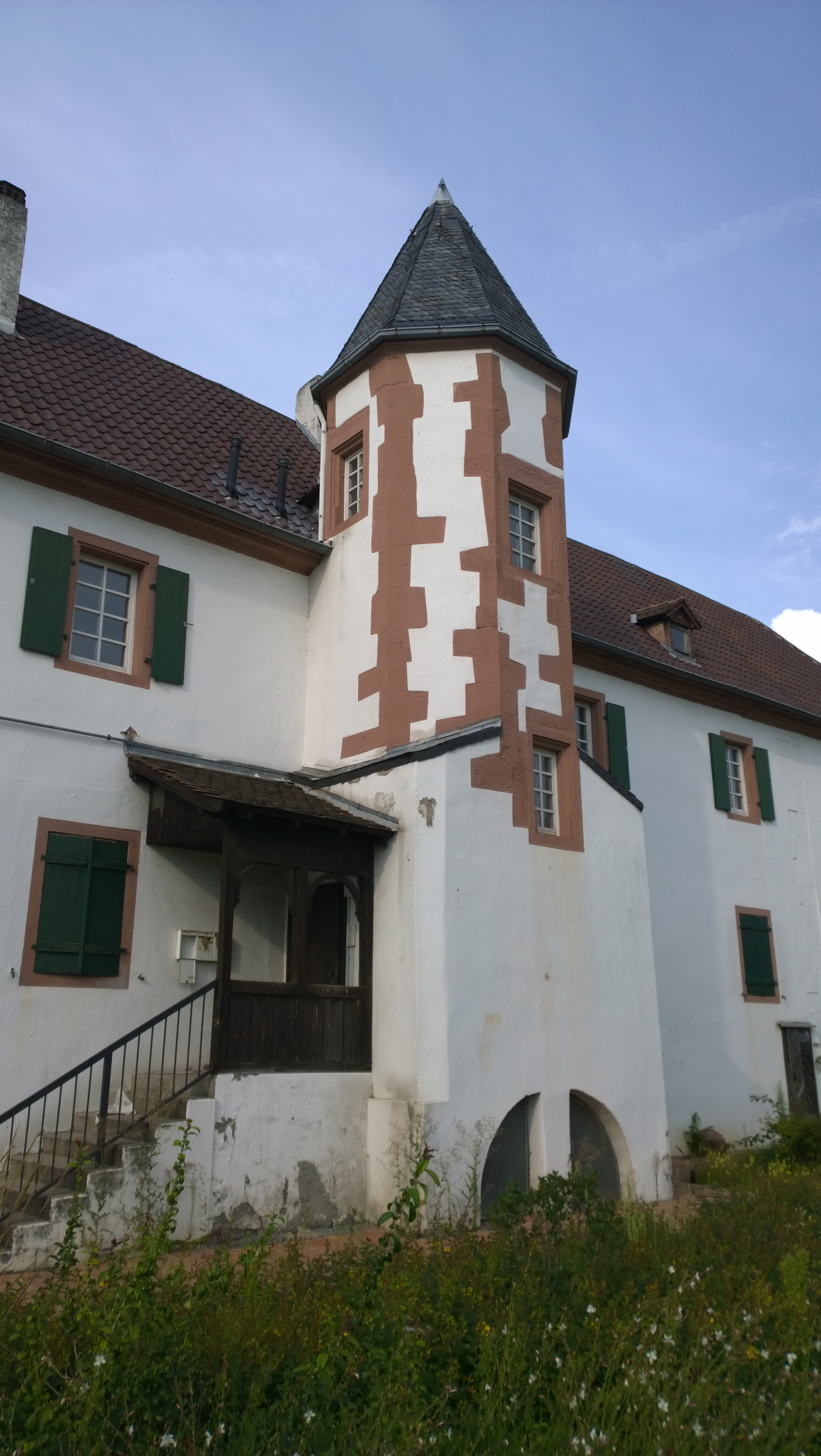 Wirtschafts- und Beamtenbau des ehemaligen Schloss Neuschloss (Friedrichsburg) - Aufgang und Turm